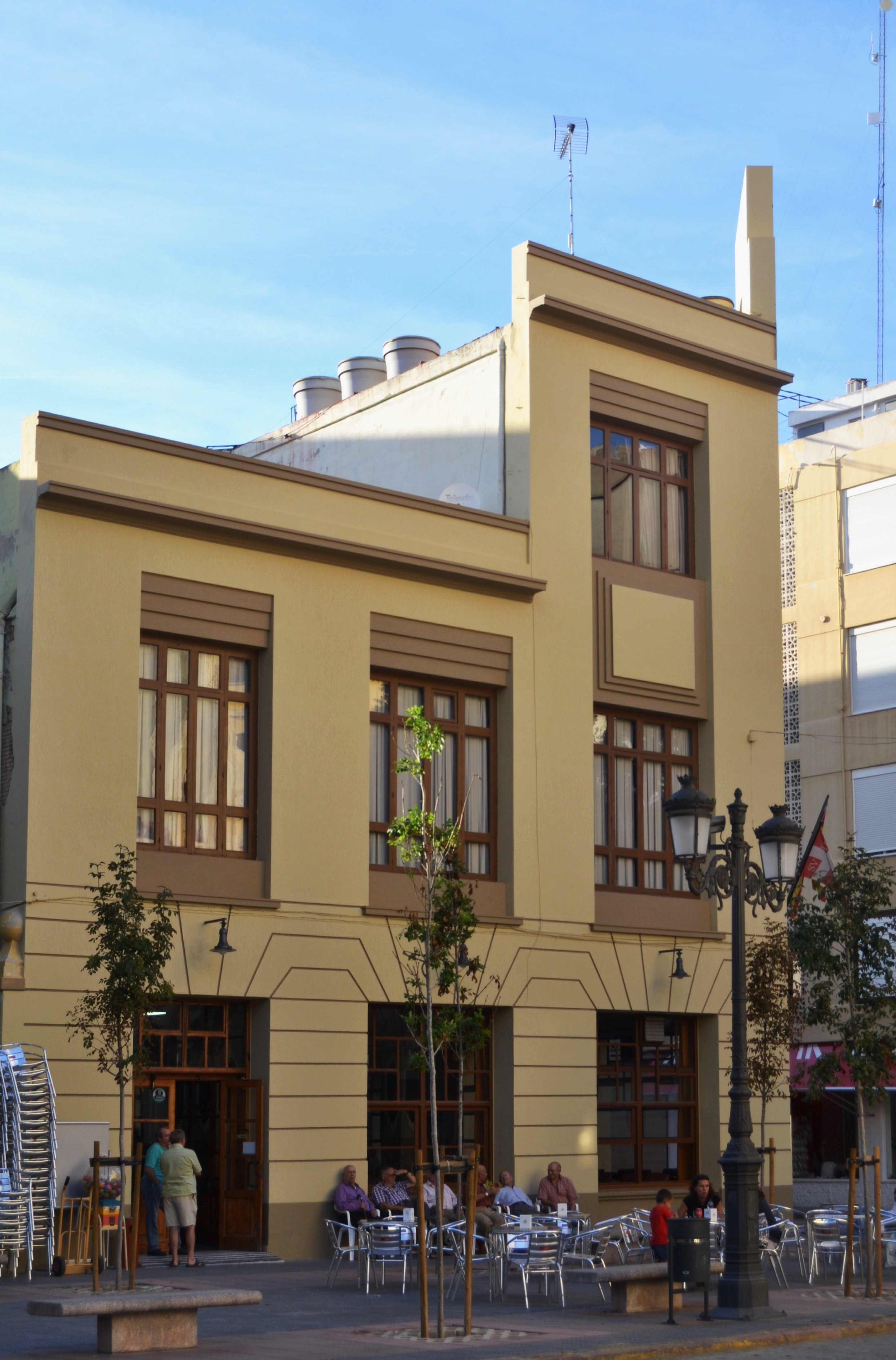 Seu de la Societat Recreativa l'Agricultura de Sueca, lateral.